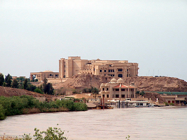 Дворец Саддама Хусейна в Тикрите